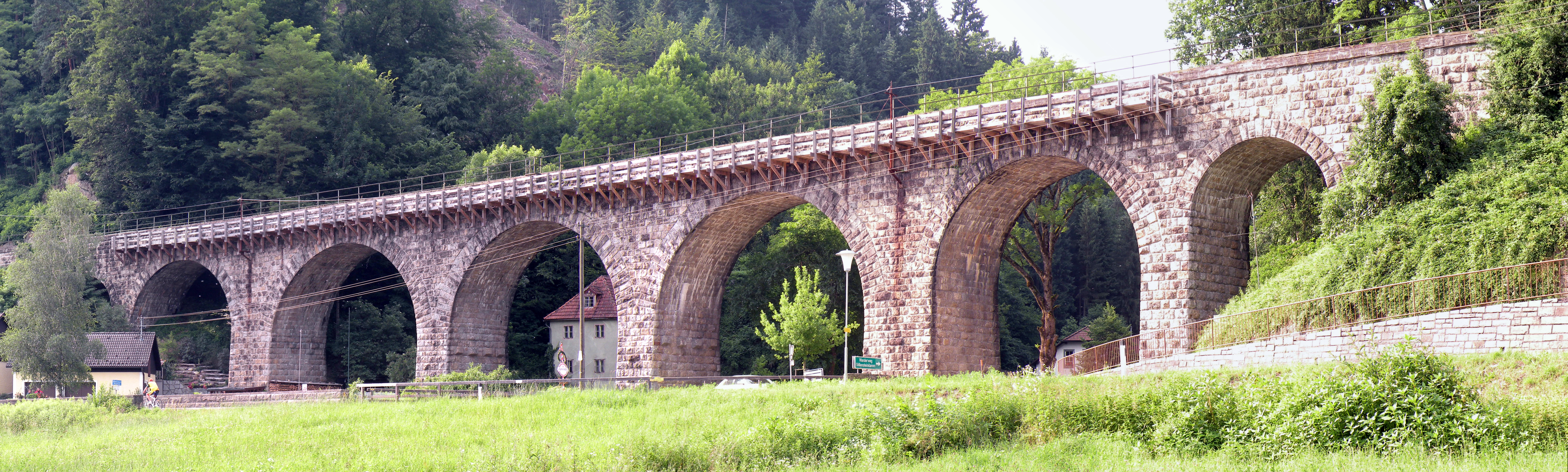 Eisenbahnviadukt über den Gießenbach an der Grenze zwischen Grein und Sankt Nikola an der Donau